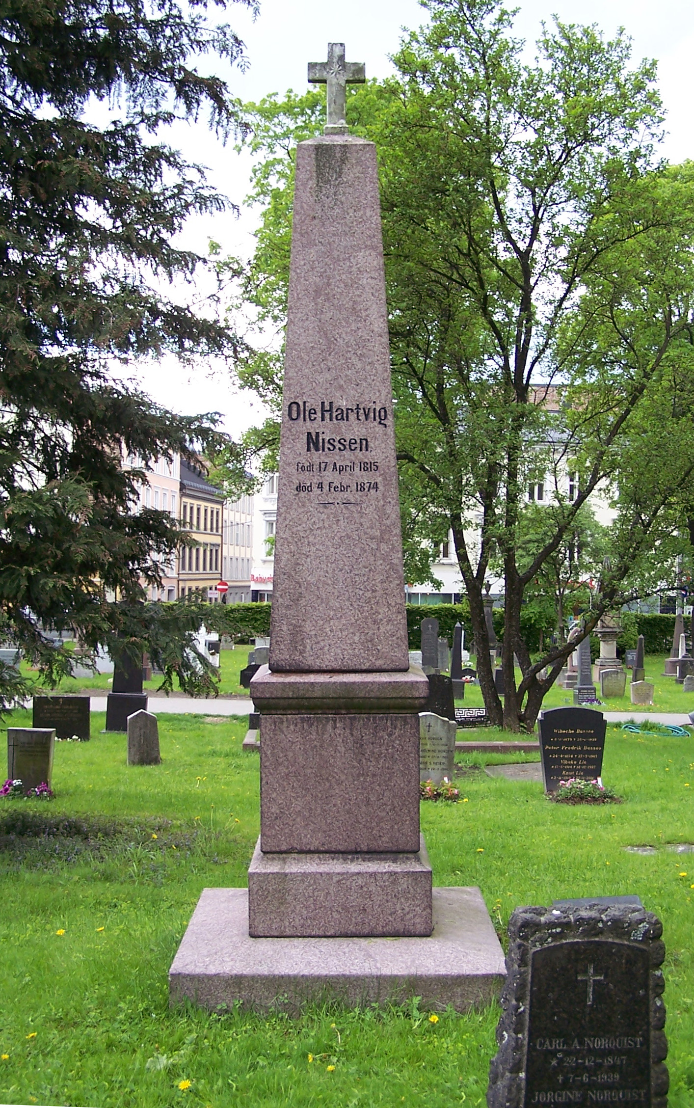 Tomb of Ole Hartvig Nissen at Vår Frelsers gravlund, Oslo